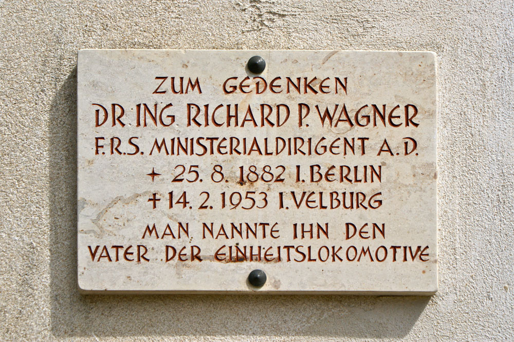 Gedenktafel an Richard Paul Wagner, den Vater der Einheitsdampflokomotive, an der Friedhofskirche in Velburg.